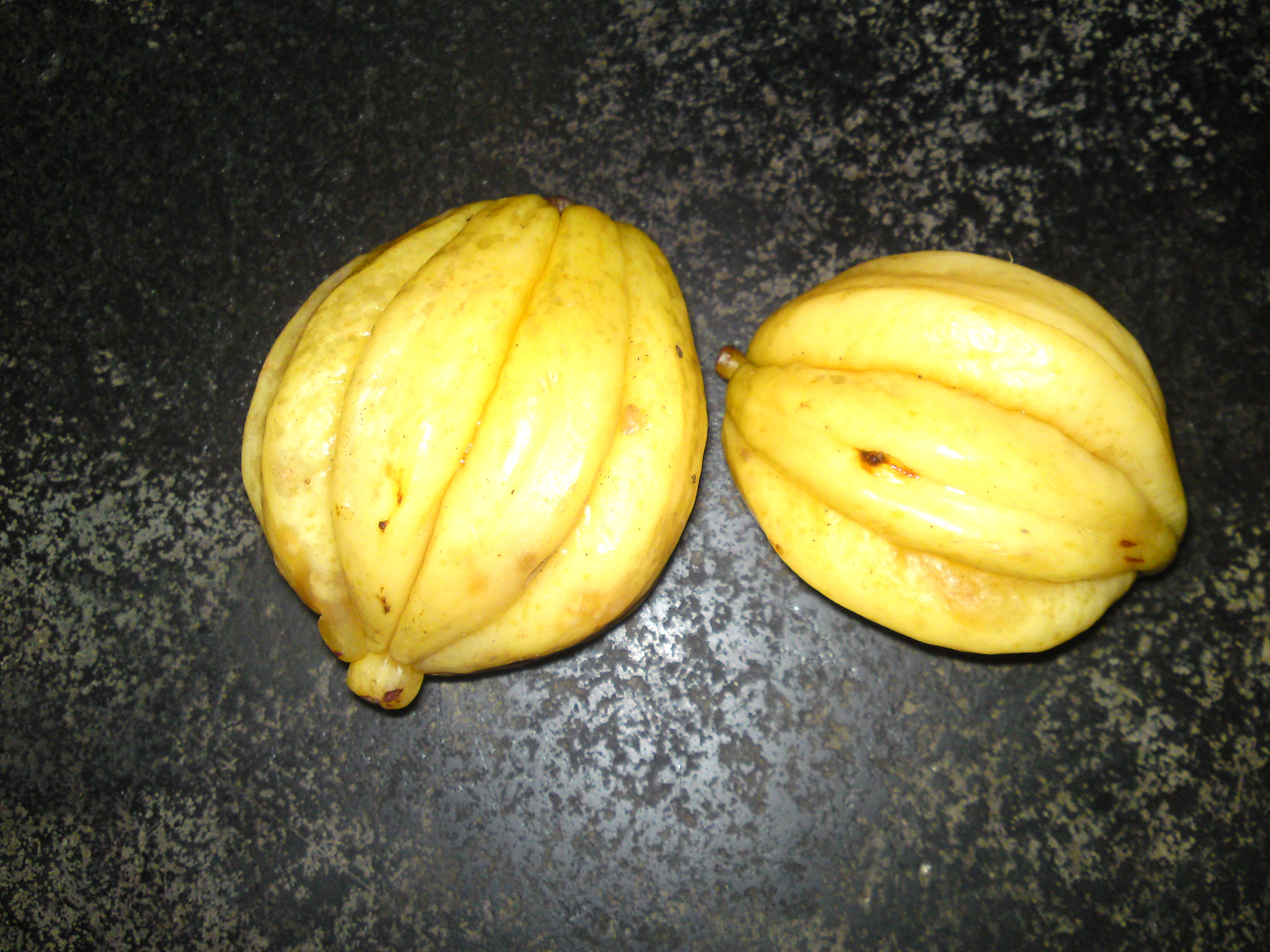 കുടംപുളി - പാകമായത്